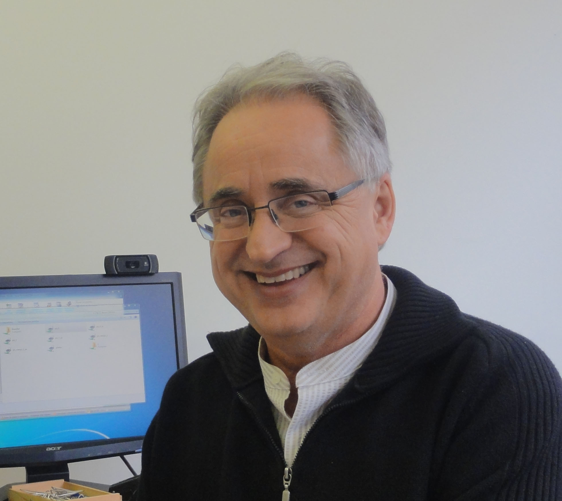 Fotografia Josep Peñuelas